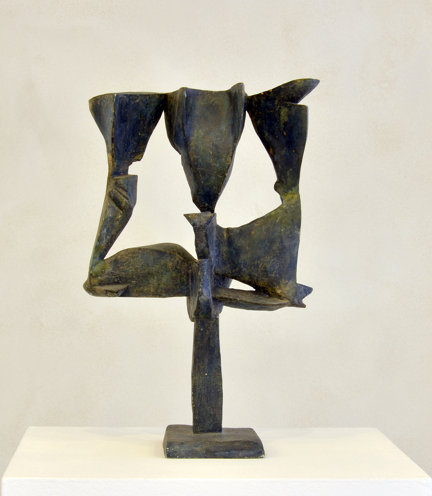 Zbyněk Sekal, Rostlina jménem O. (1967), patinovaná sádra